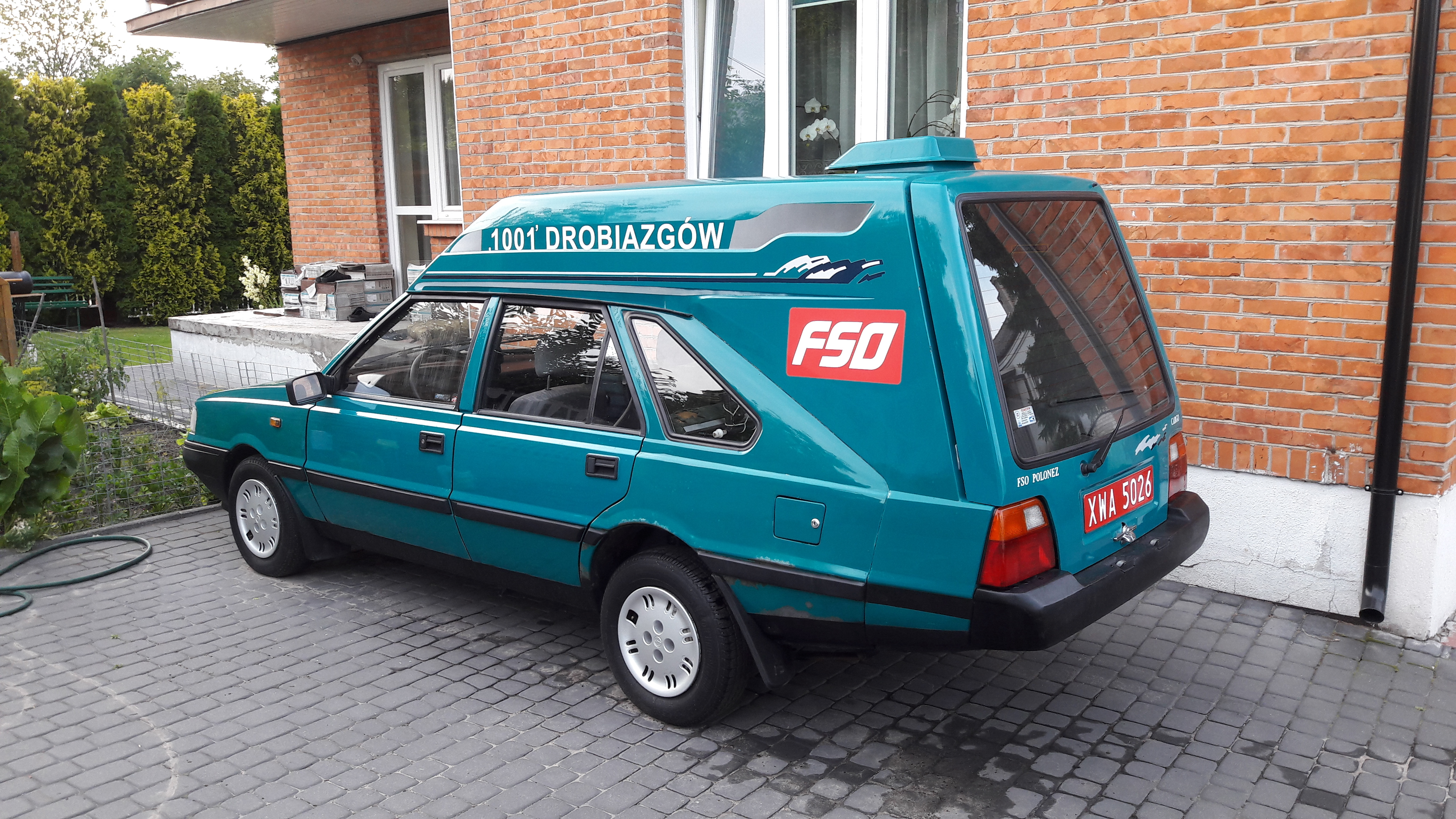 Prototyp FSO Polonez Cargo, stan zachowania na dzień dzisiejszy.